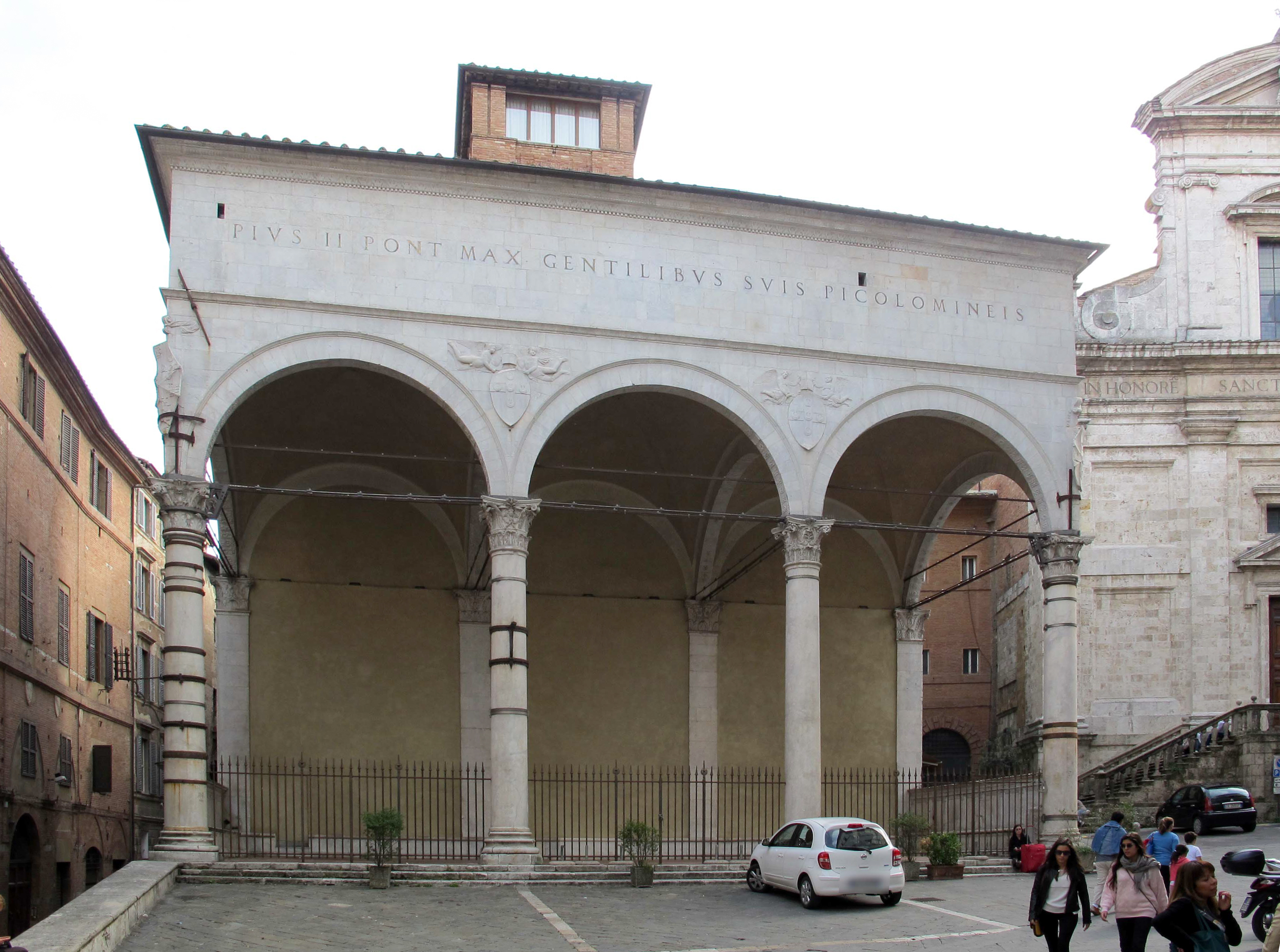 Banchi di Sotto, Siena